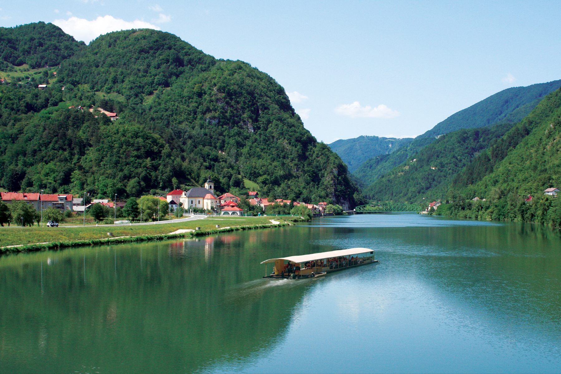 Panoramska - Radeče in splav.